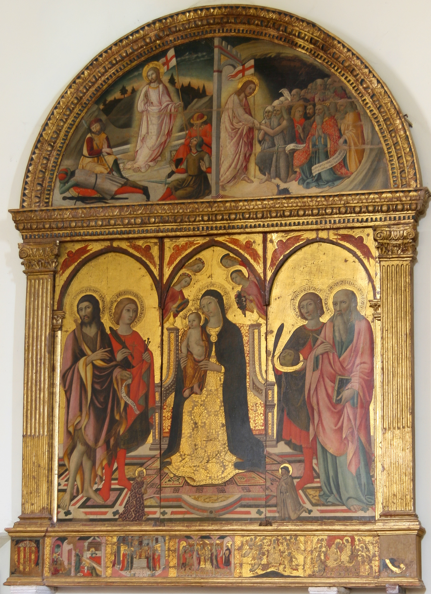 Polittico di Sano di Pietro nella collegiata dei Santi Quirico e Giulitta a San Quirico d'Orcia